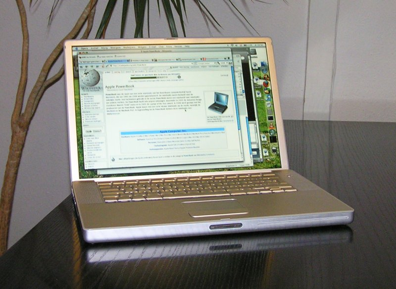 PowerBook G4, aluminium. Zelfgemaakte foto.